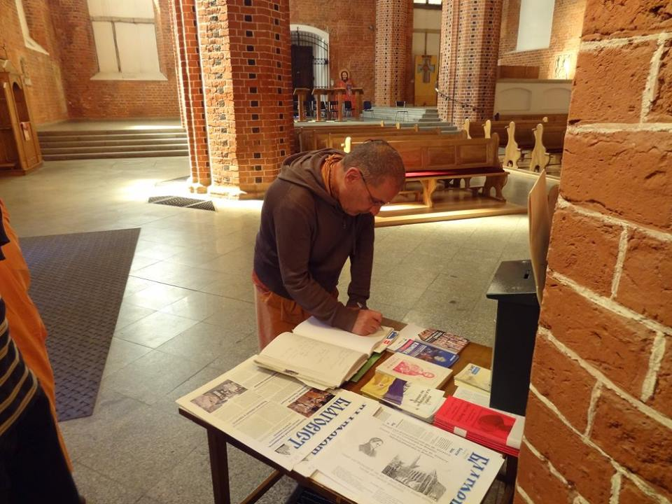 Свамі Тріпурарі розписався в пам'ятній книзі.